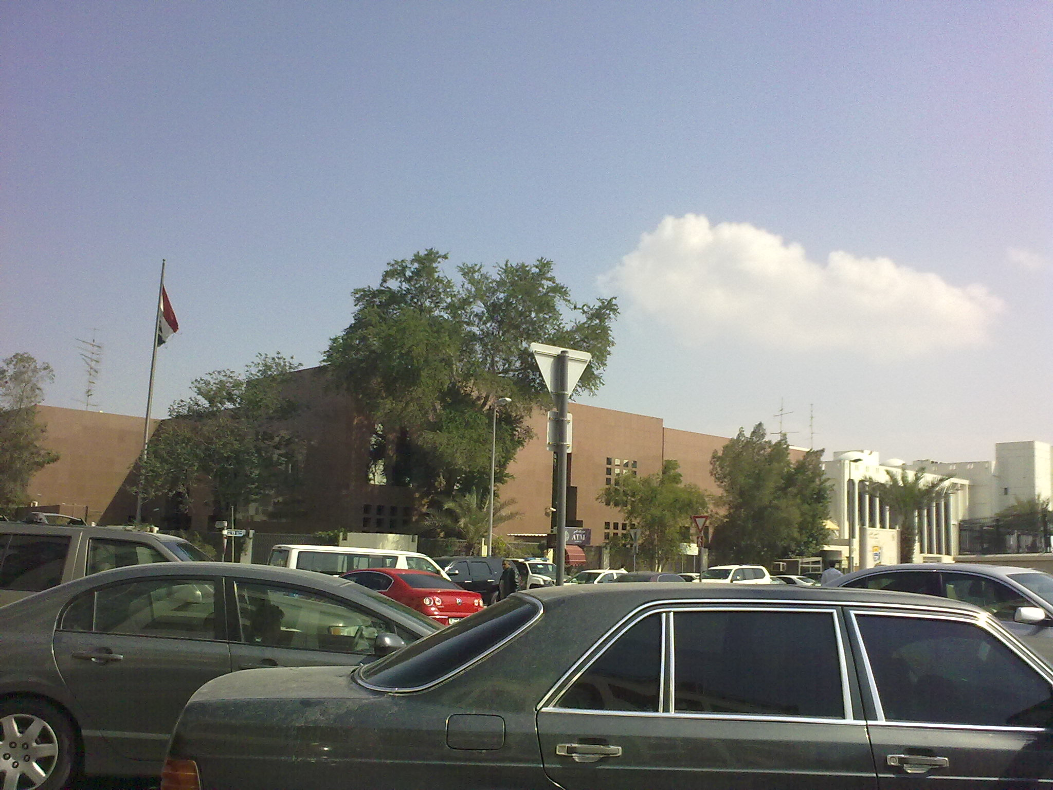 Egyptian Consulate in Dubai القنصلية المصرية بدبي